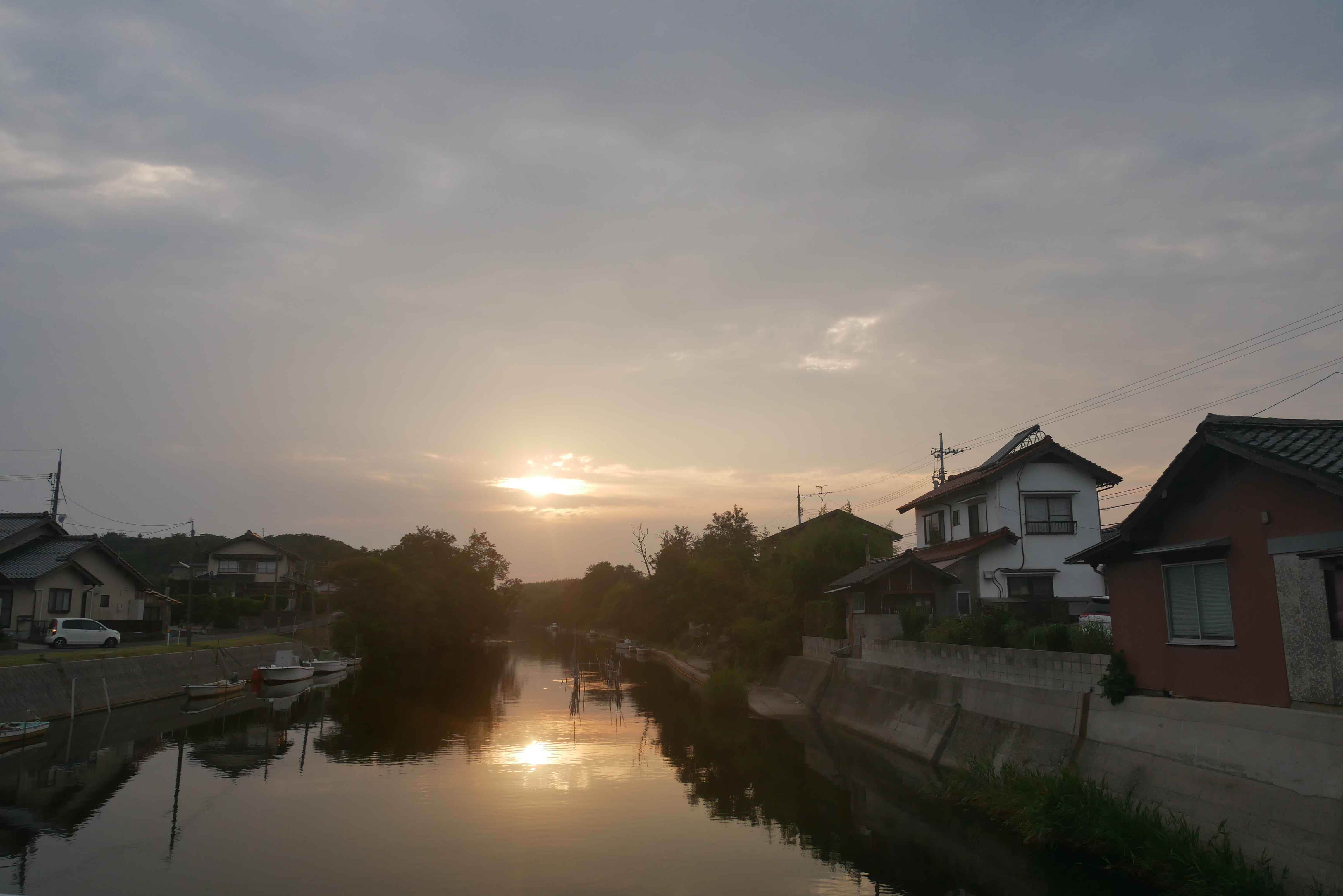 十間川（じっけんがわ, Jiggengawa river） Panasonic Lumix DMC-GX7 Mark II